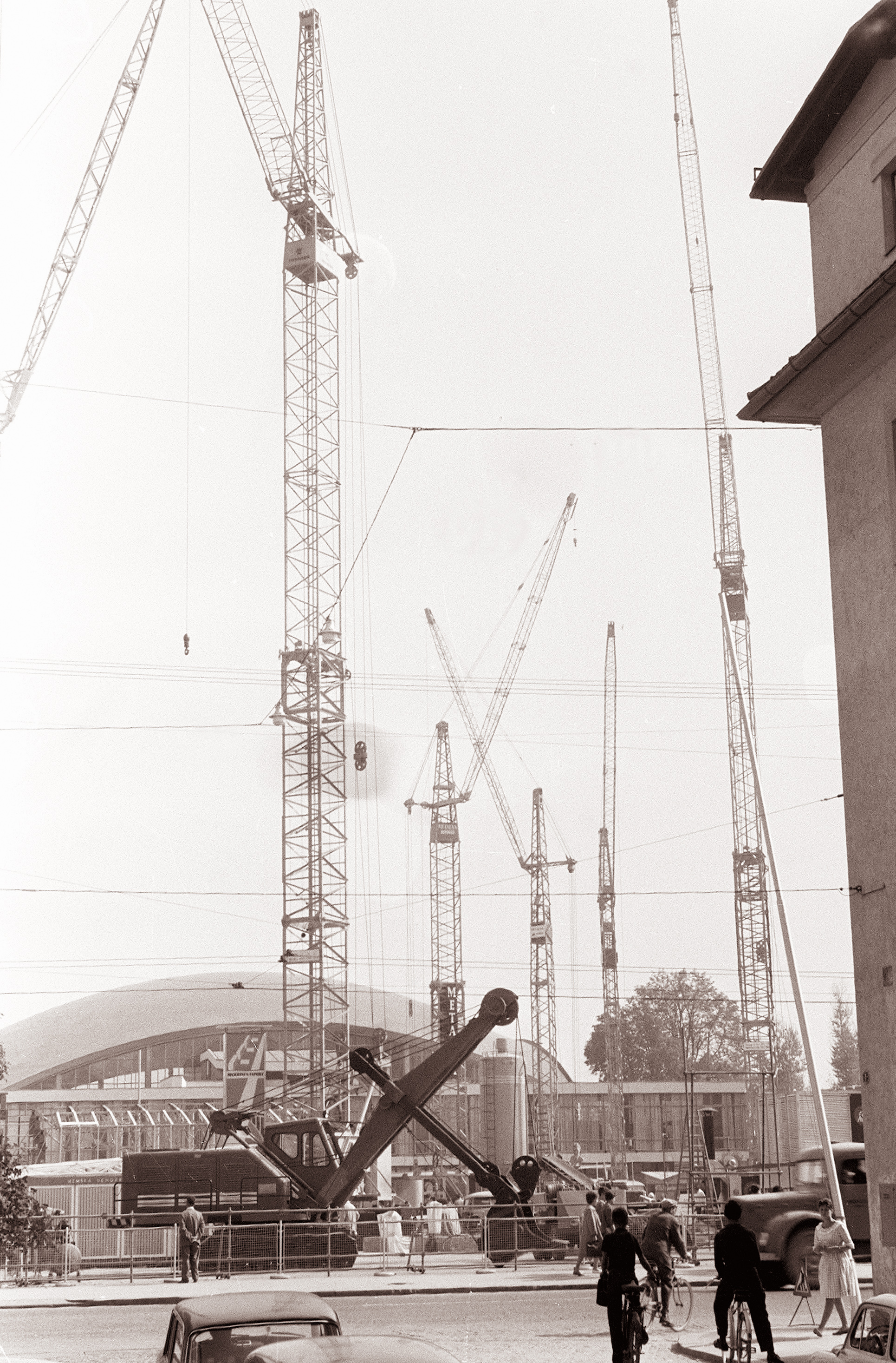 Mednarodni sejem gradbeništva v Ljubljani